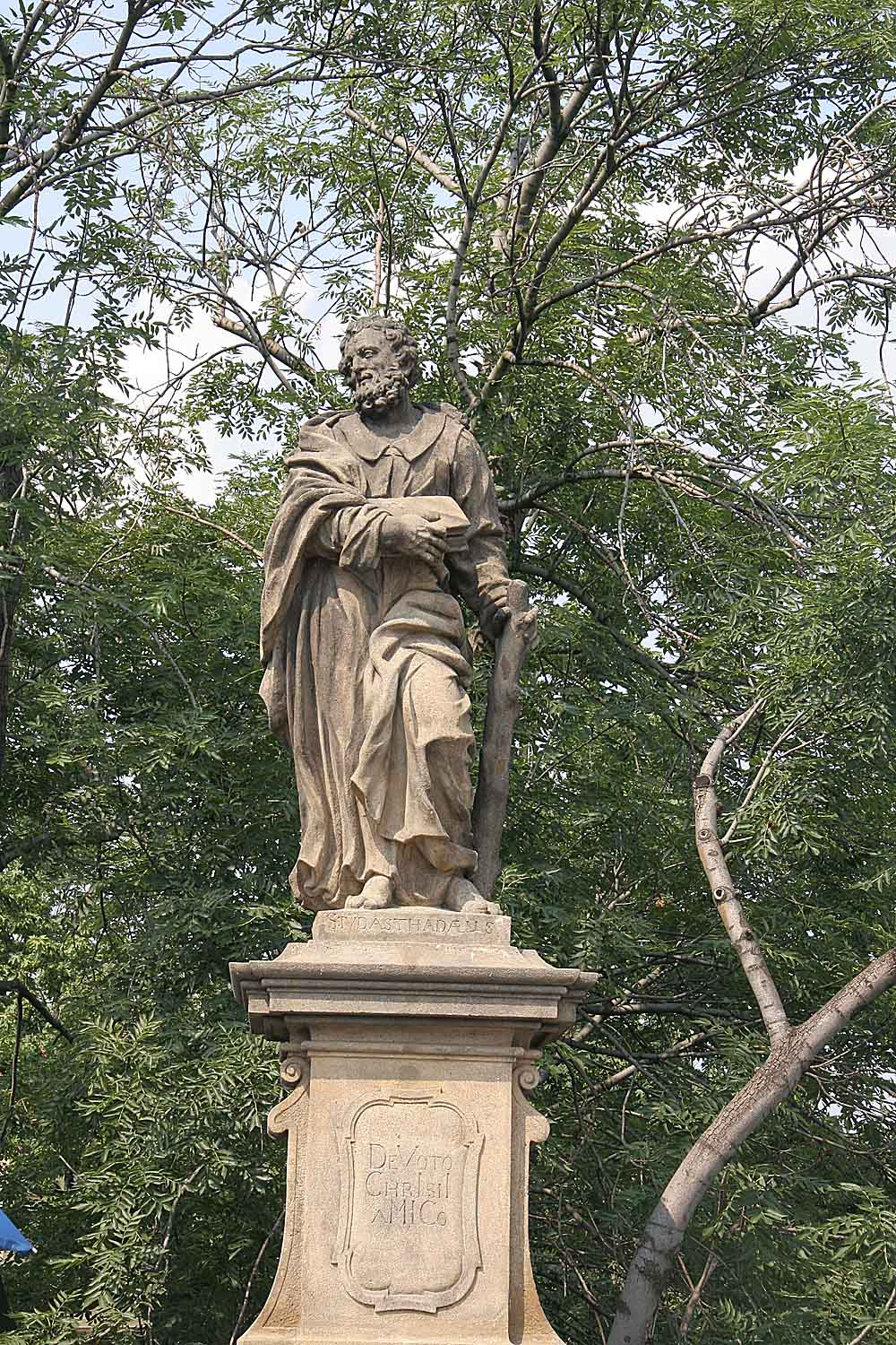 Česky: Sousoší Svatého Judy Tadeáše na Karlově mostě, Praha-Malá Strana, ostrov Kampa.